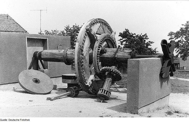 Original image description from the Deutsche Fotothek Obercunnersdorf-Kottmarsdorf. Burkmühle, neuer Standort des Kammrades der Hempelmühle in Schönbach von 1752